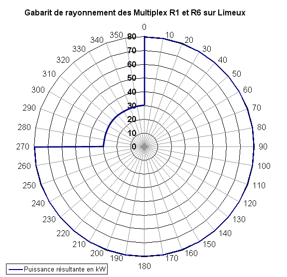 gabarit de rayonnement émetteur de Limeux Mux R1 et R6